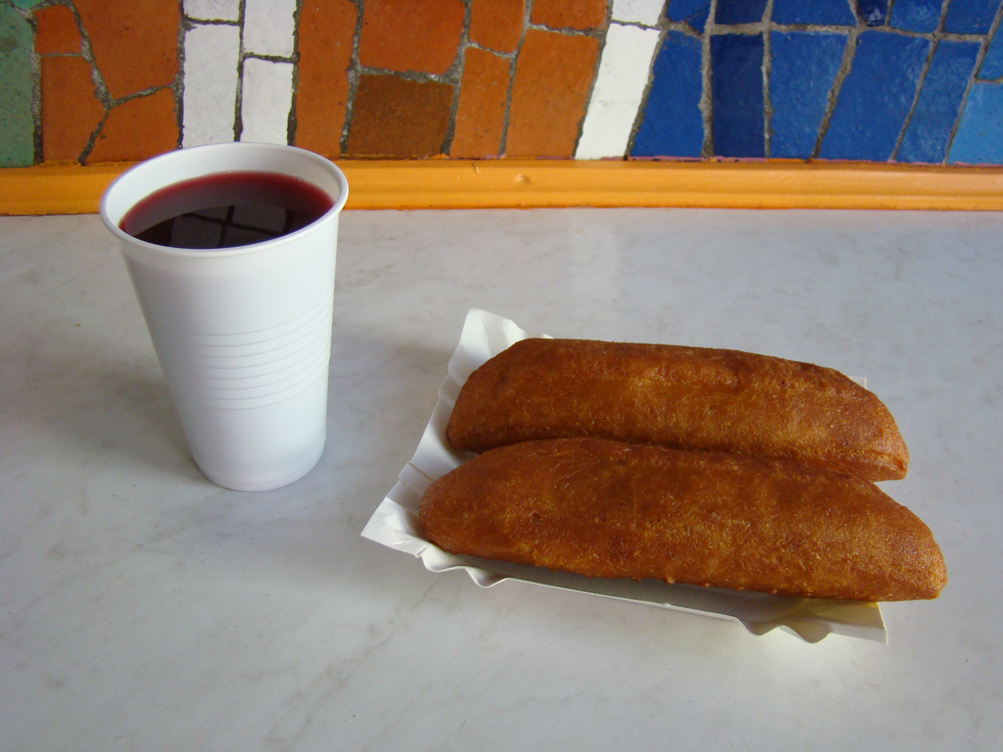 Pasztecik szczeciński serwowany z czerwonym barszczem w lokalu przy al. Wojska Polskiego w Szczecinie